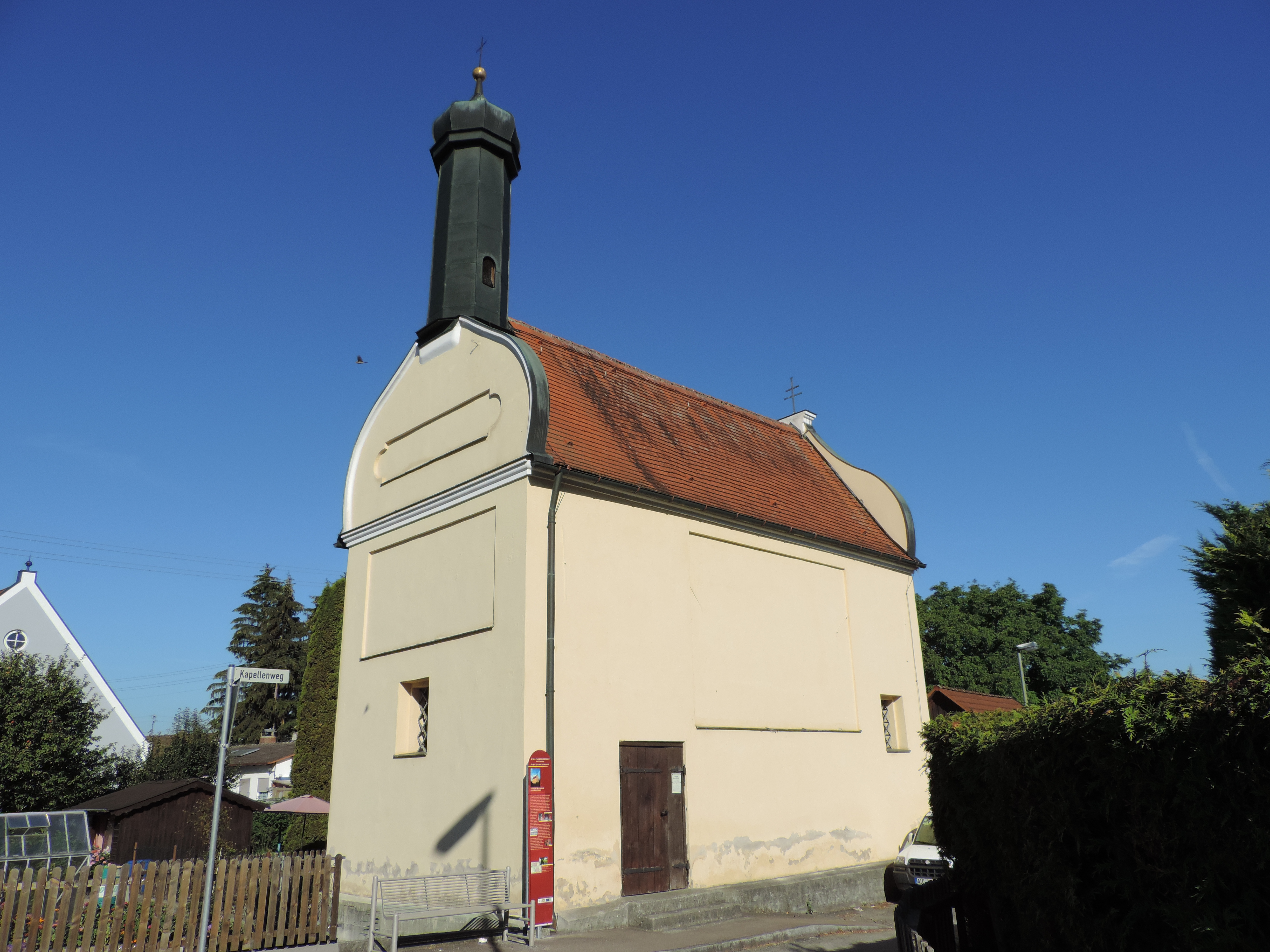 Südostseite